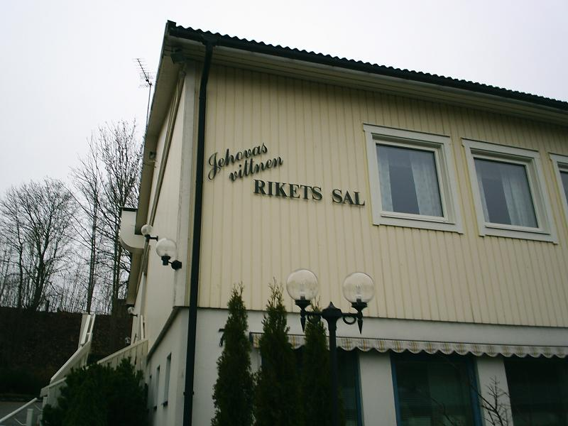 En bild på en Jehovas Vittnens Rikets Sal. Foto av CNB.